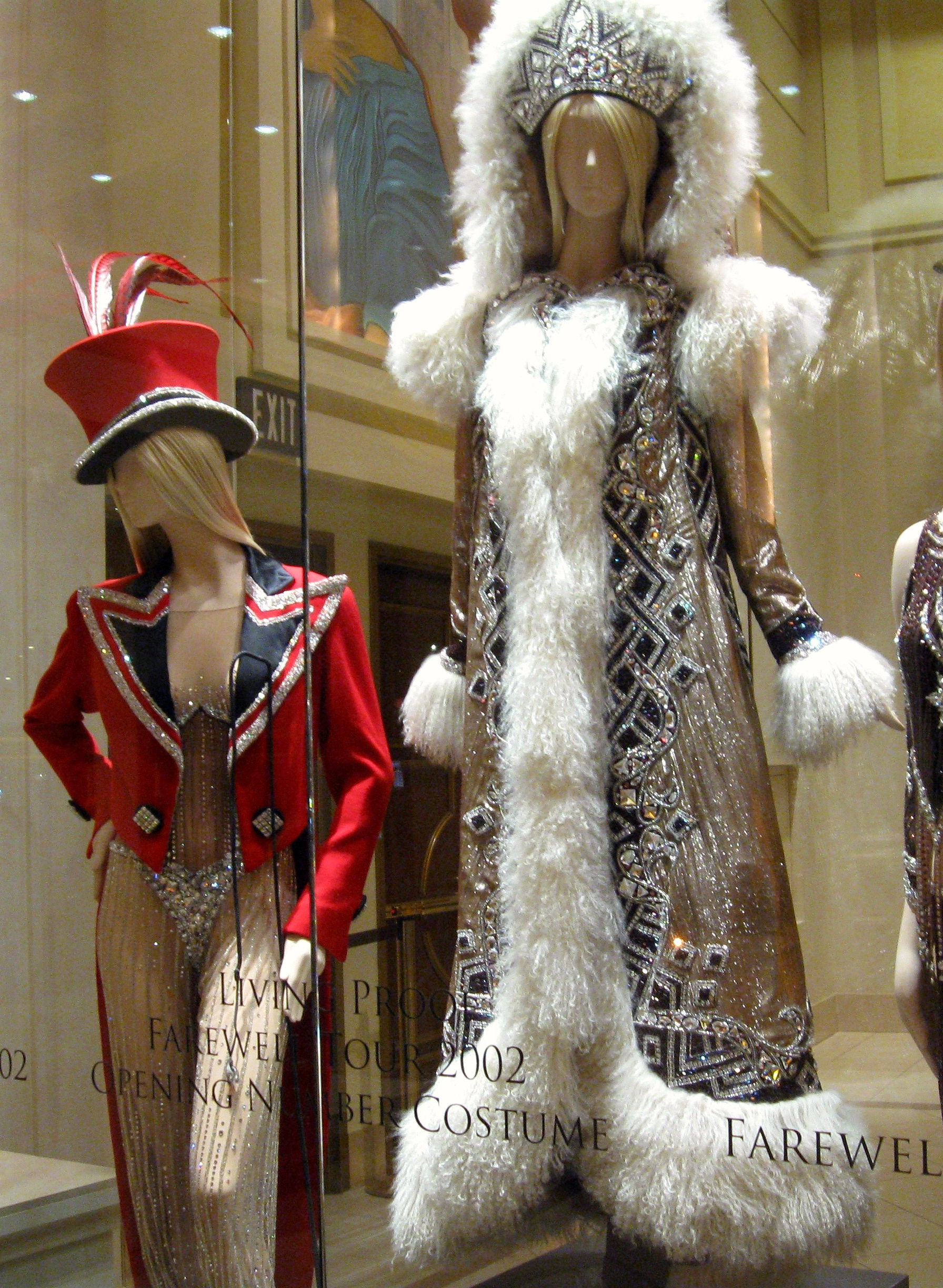 Vestuario de la gira Farewell Tour que utilizo Cher, exhibida en el coliseo Caesars Palace.